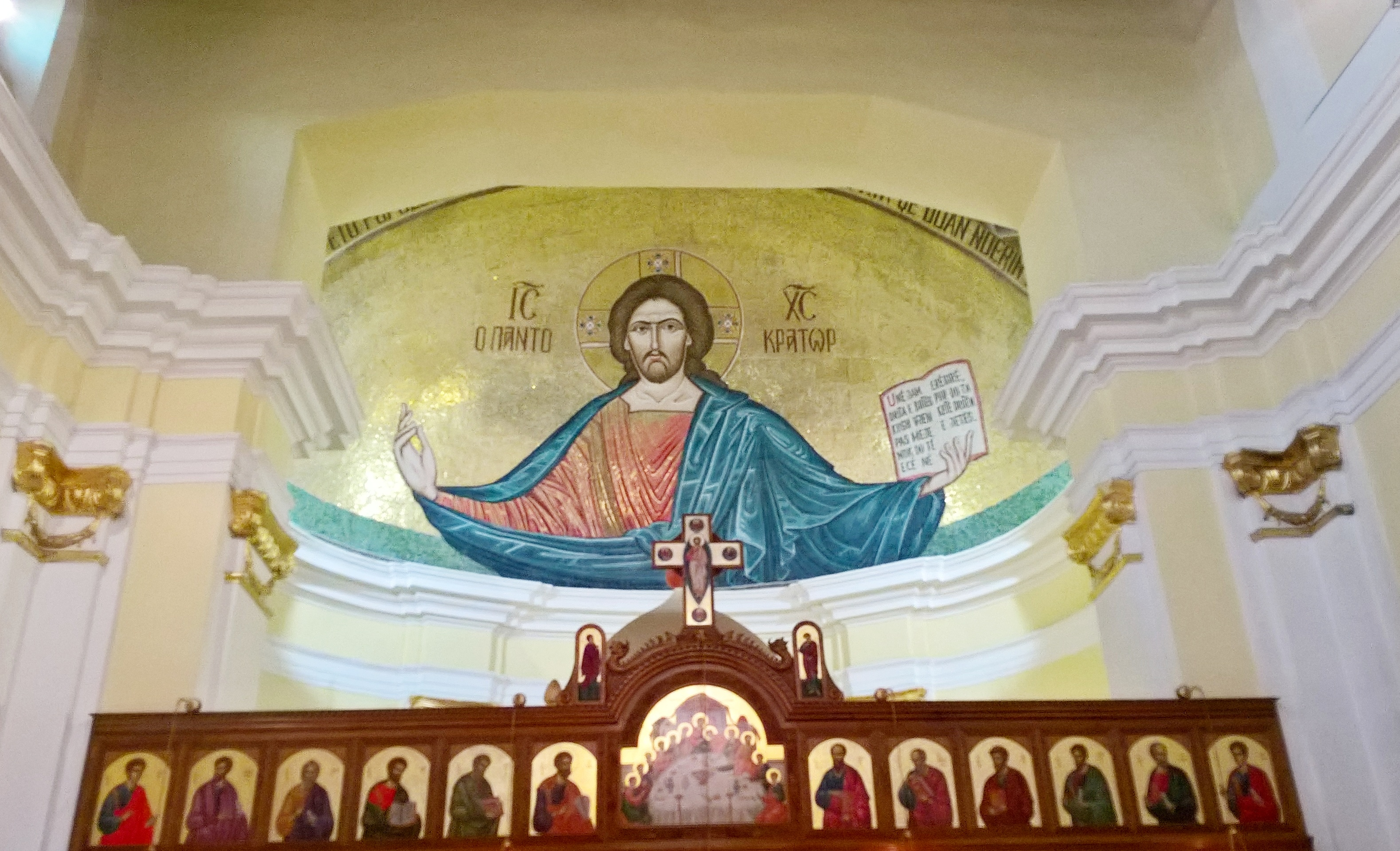 Santuario con fresco del Cristo Pantocratore